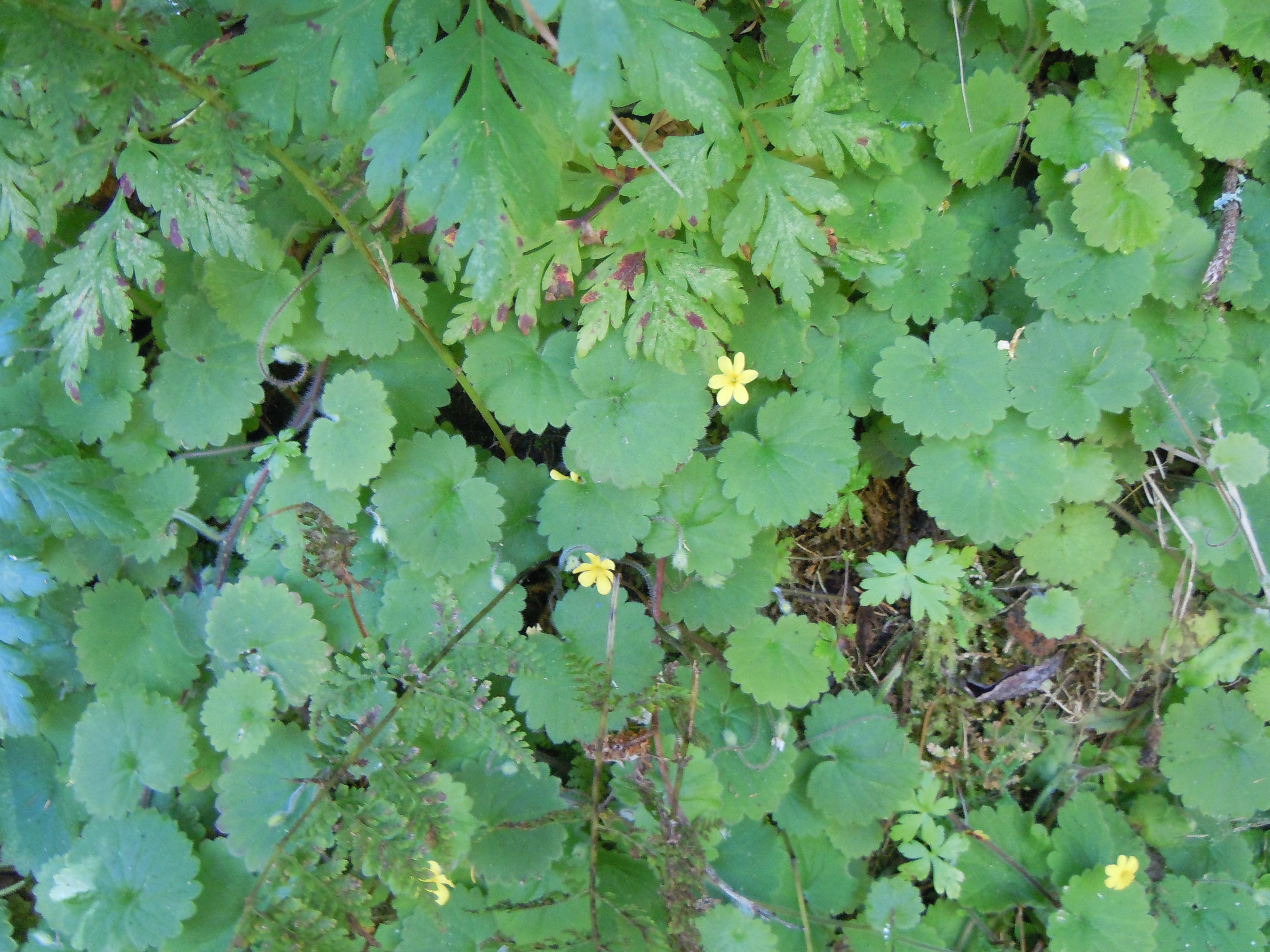 Sibthorpia peregrina - Levada das 25 Fontes - Madere